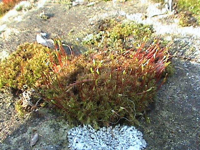 Ceratodon purpureus (Habitus)